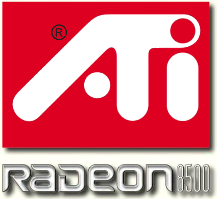 Das Logo der ATI-Radeon-8500-Grafikkartenserie